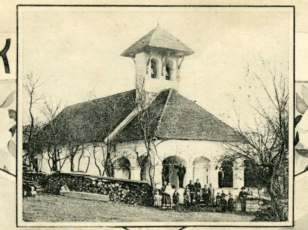 Razglednica Nadleska.